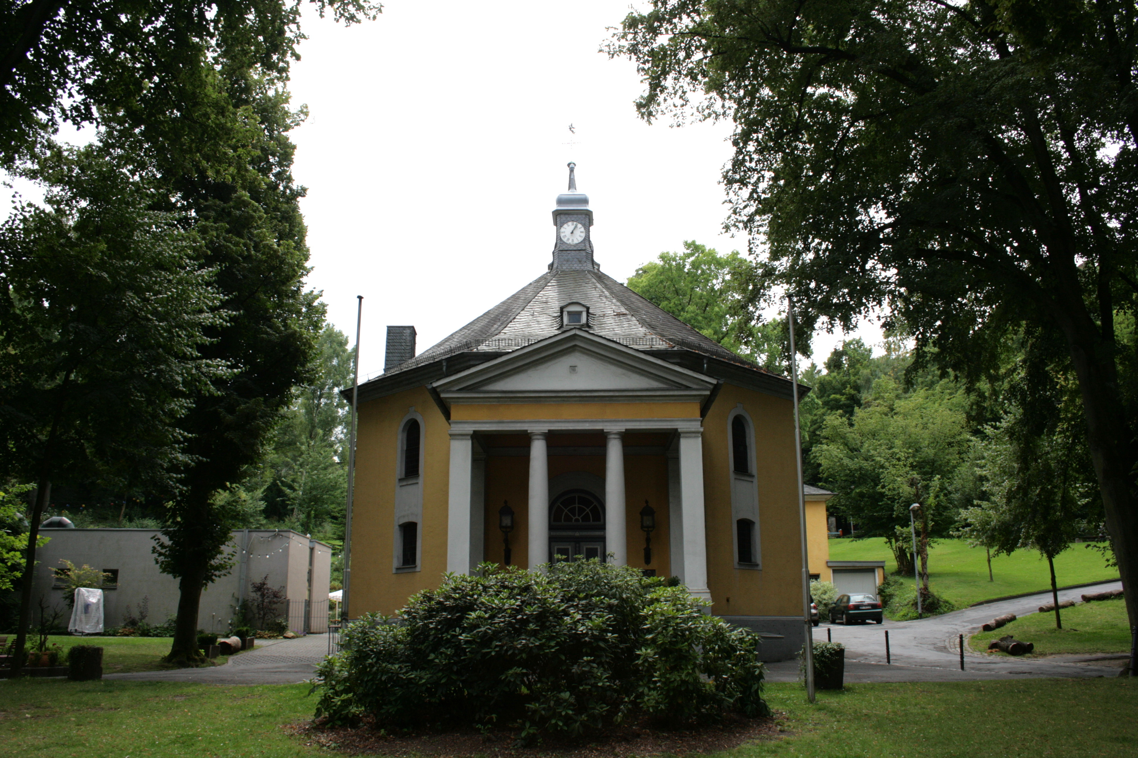 Evangelische Gnadenkirche, Hauptstraße 264 in Bergisch Gladbach